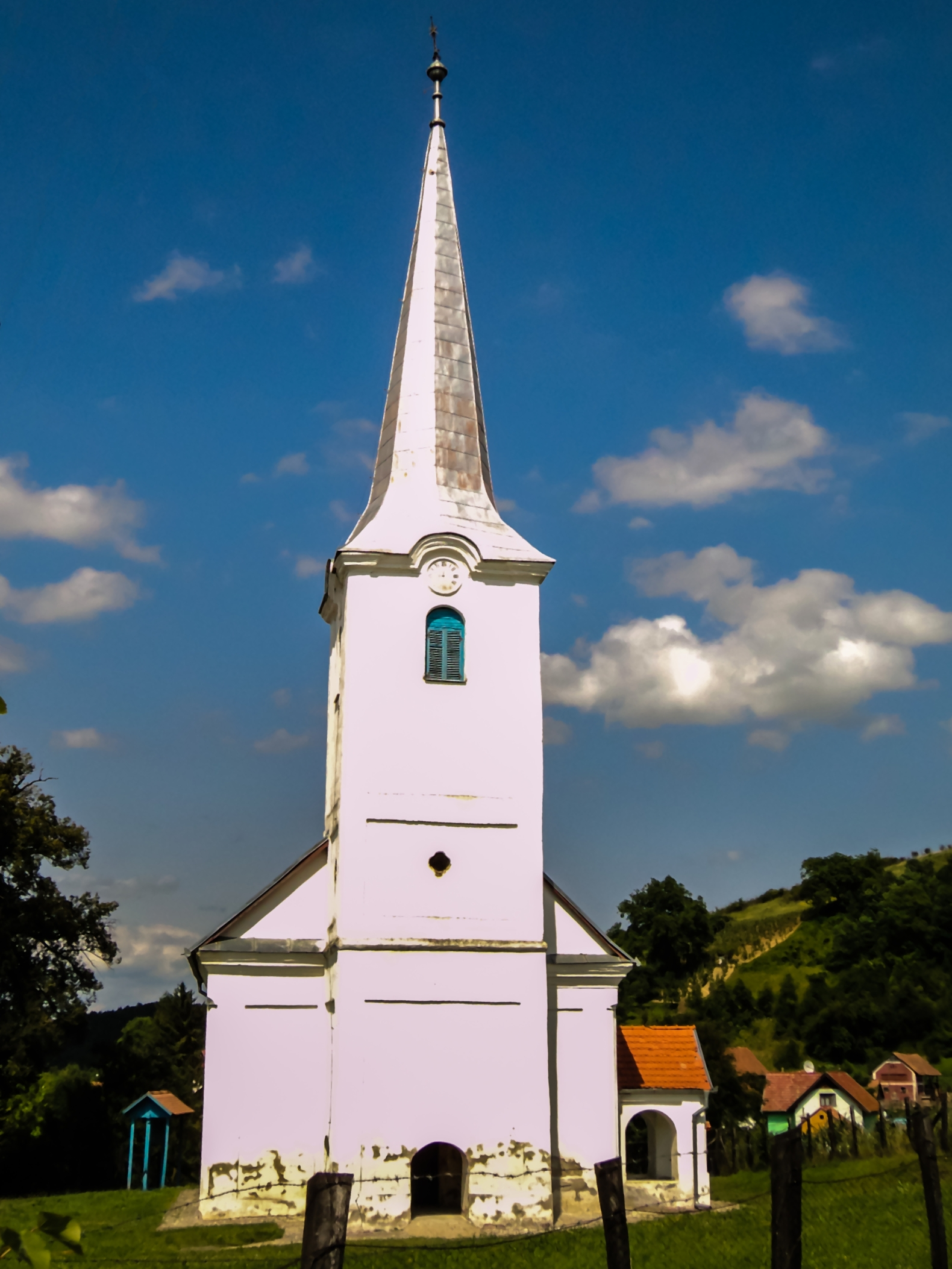 Csejd, református templom